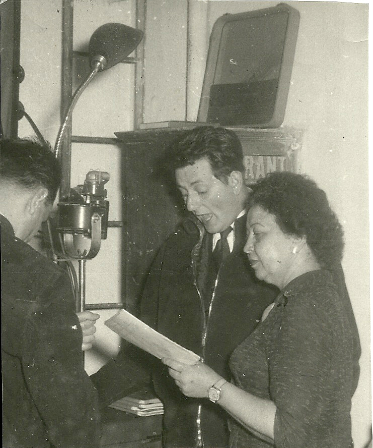 U mikrofonu s Milošem Kirschnerem a Fr. Flajšhansem